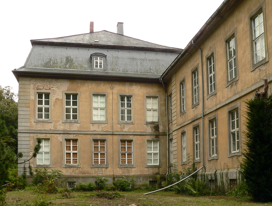 Mittelbau und Seitenflügel von Schloss Wrisbergholzen am Tag des offenen Denkmals 2011